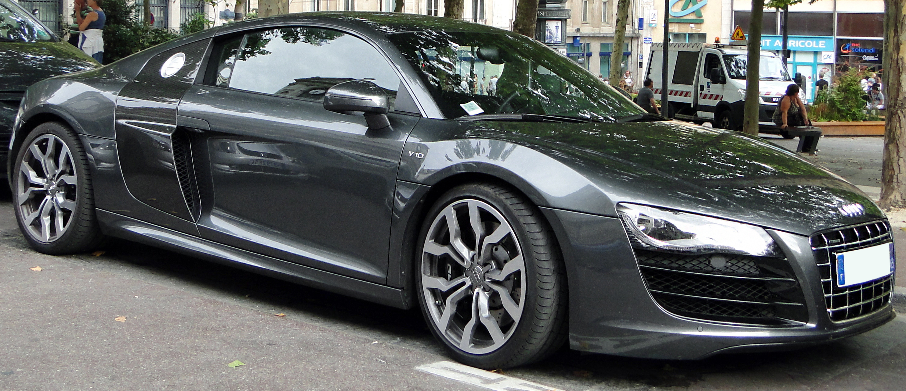 Audi R8 V10